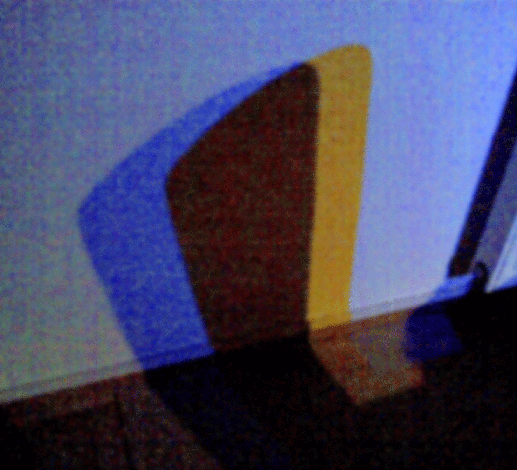 Bei der gleichzeitigen Beleuchtung mit einer neutralweißen Halogenlichtquelle und einem blauen LED-Strahler (beide mit 20 Watt) entstehen hinter Gegenständen farbige Schatten auf einer weißen Wand. Beide Lichtquellen stehen 30 Zentimeter auseinander, die beschattete Wand ist 4 Meter entfernt und der schattenwerfende Stuhl steht ca. 1 Meter von der Wand entfernt.